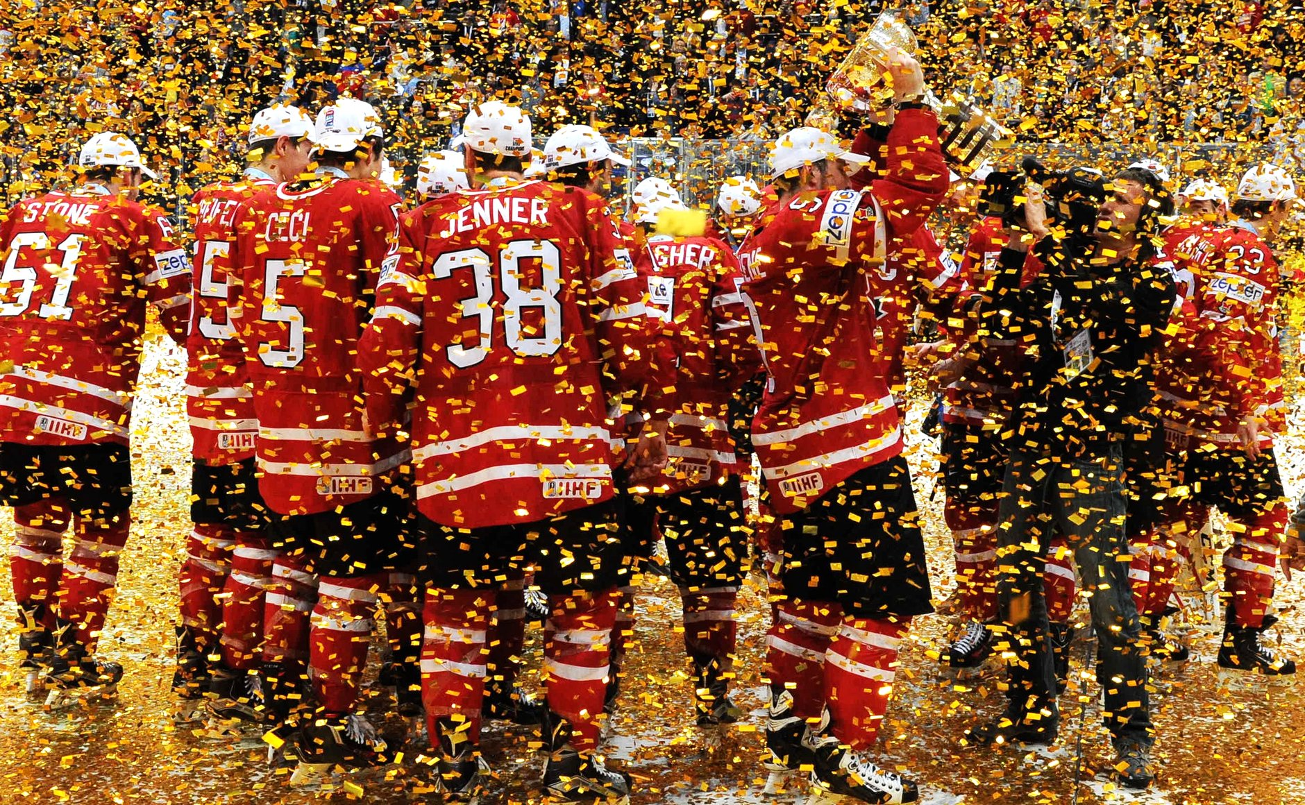 Игроки сборной Канады на церемонии награждения победителей чемпионата мира по хоккею